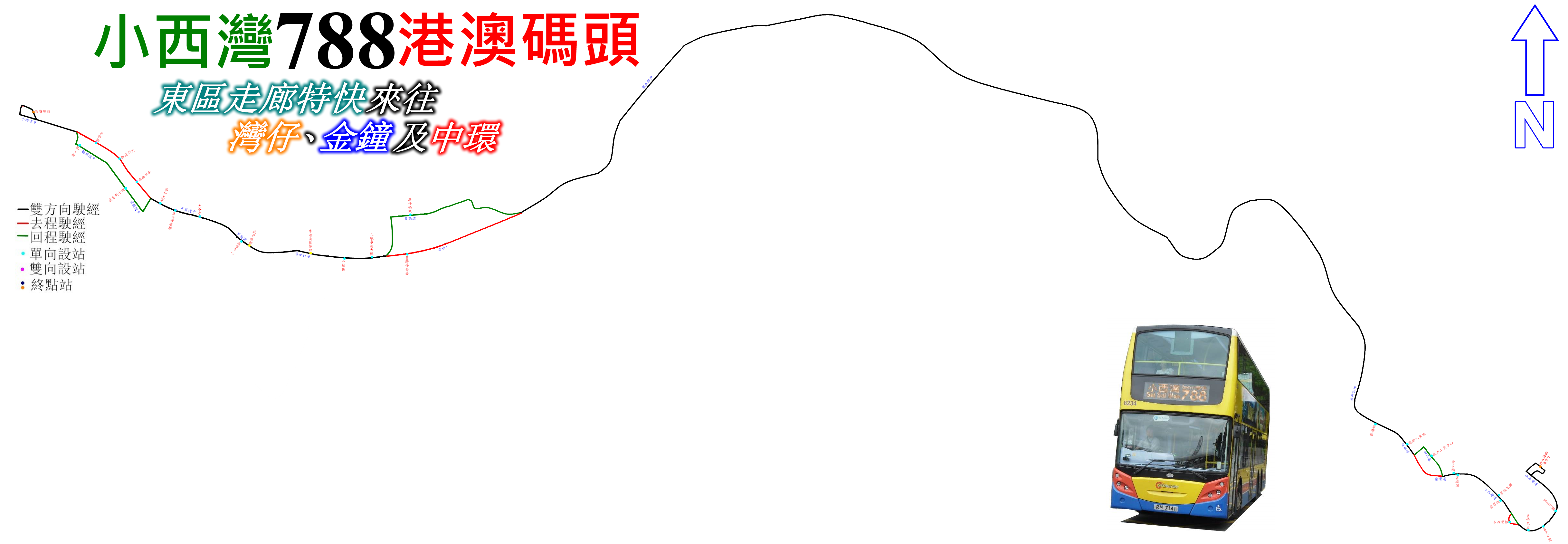 中文（香港）: 城巴788線的走線圖